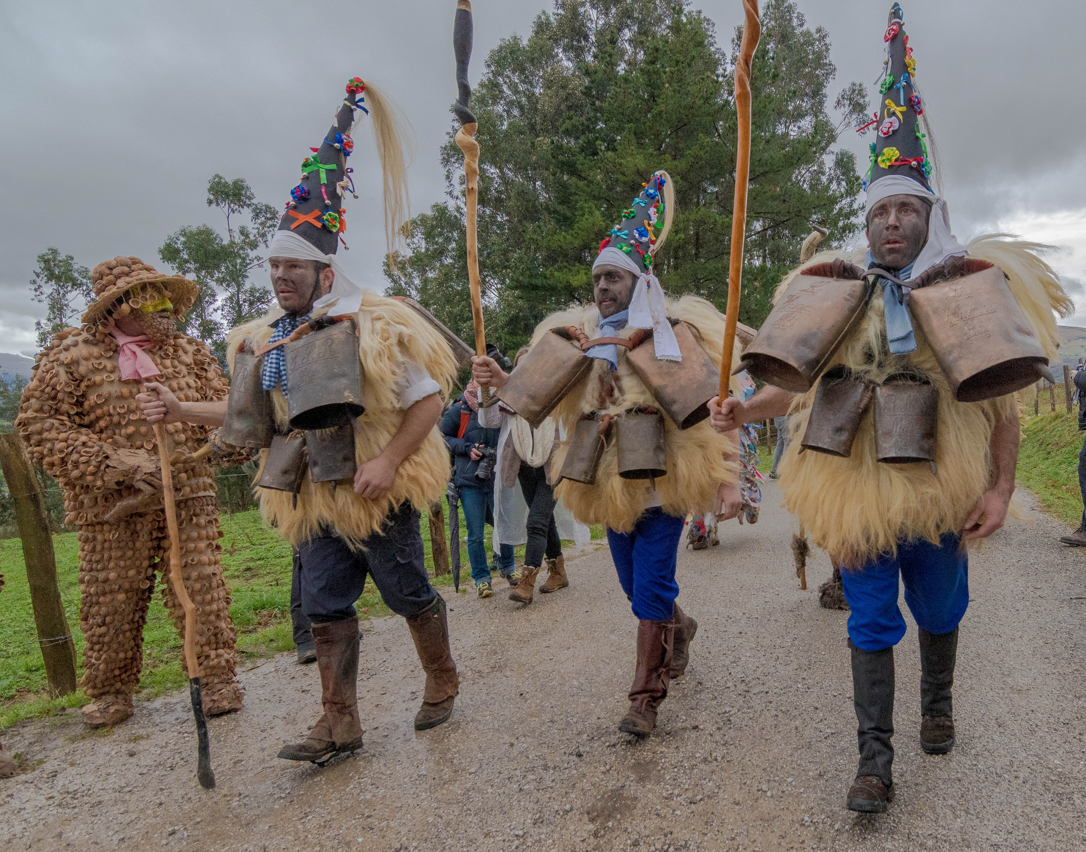 La Vijanera, primer carnaval del año en Silio, Cantabria, España. This is a photography of a Folklore festival in Spain (Wikidata id Q648409).